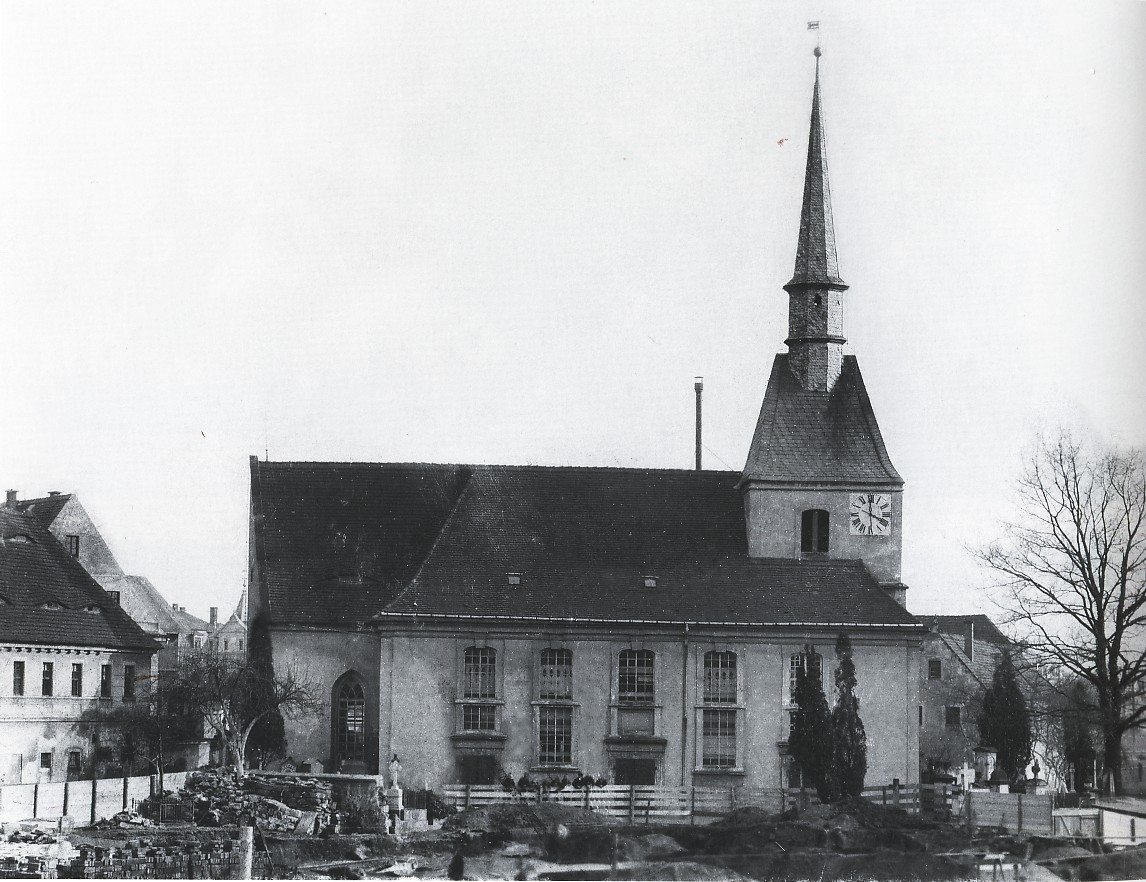 Pfarrkirche in Dresden-Leuben, vor der Abtragung der Kirche wahrscheinlich 1899 (zur Zeit der Grundsteinlegung für die neue Himmelfahrtskirche)